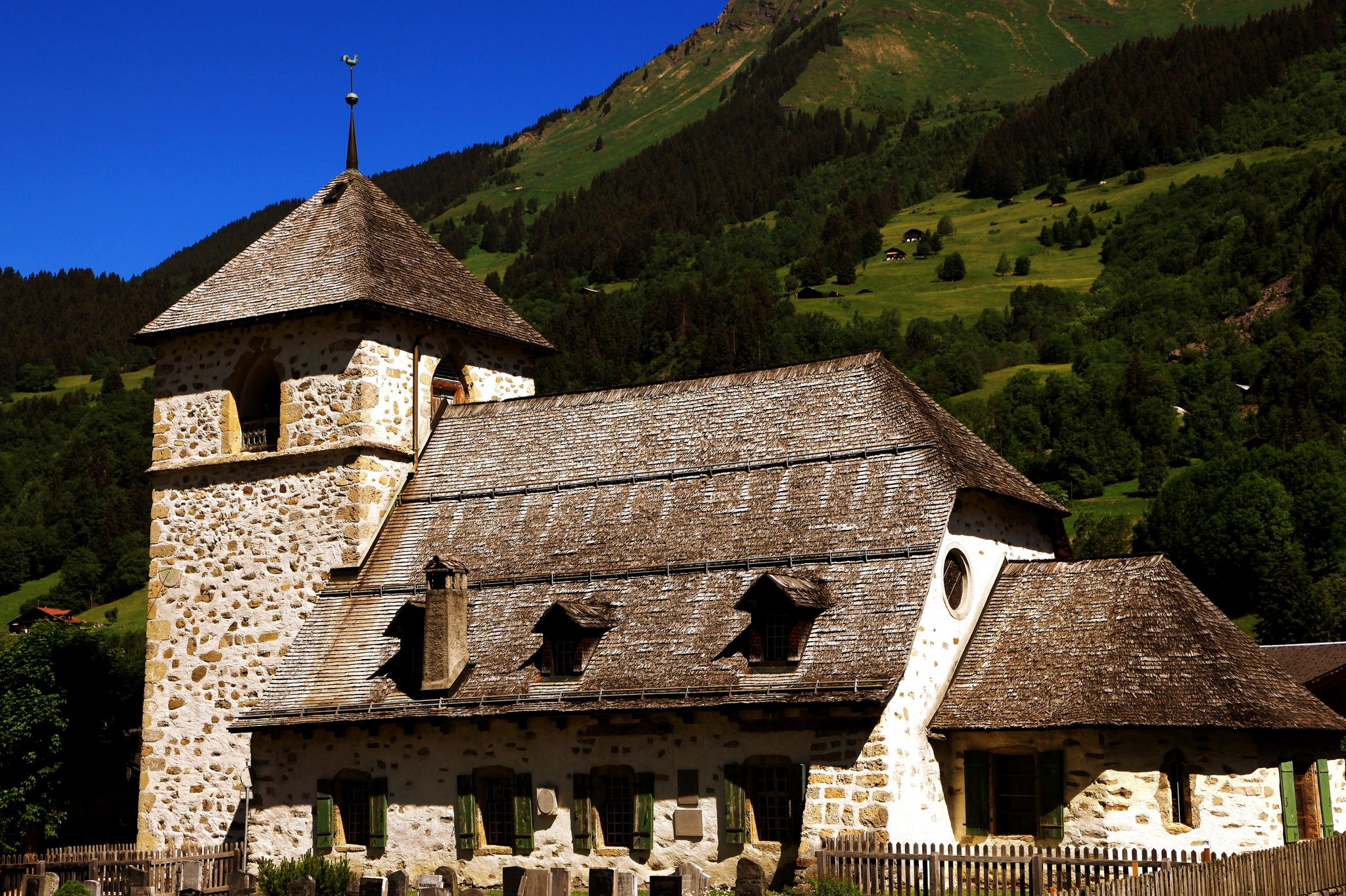 Vers L'Eglise